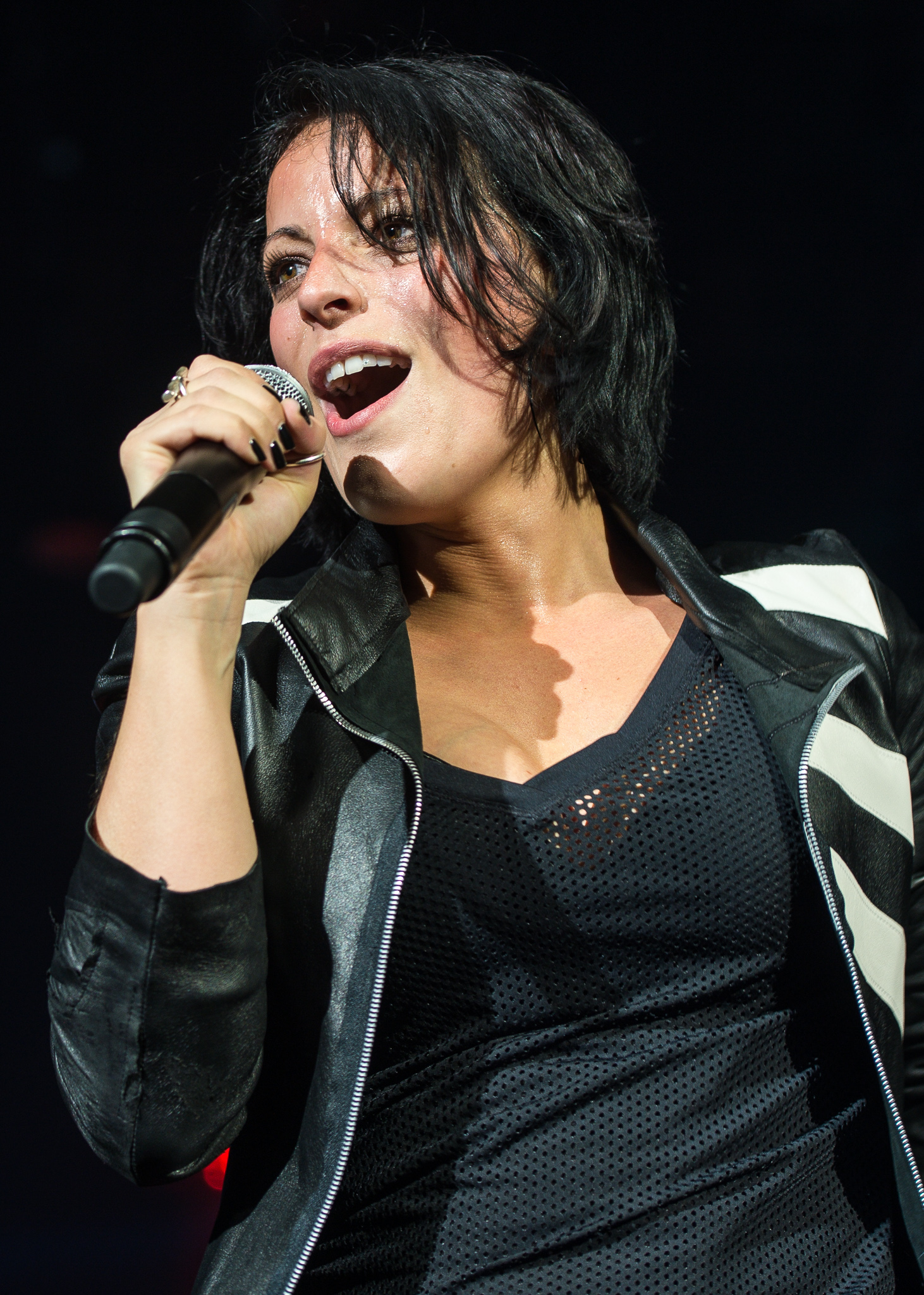 Arena Nürnberger Versicherungen,Concertbüro Franken,Konzert,Livekonzert,Livemusik,Musik,Silbermond,Stefanie Kloß,Leichtes Gepäck Tour 2016